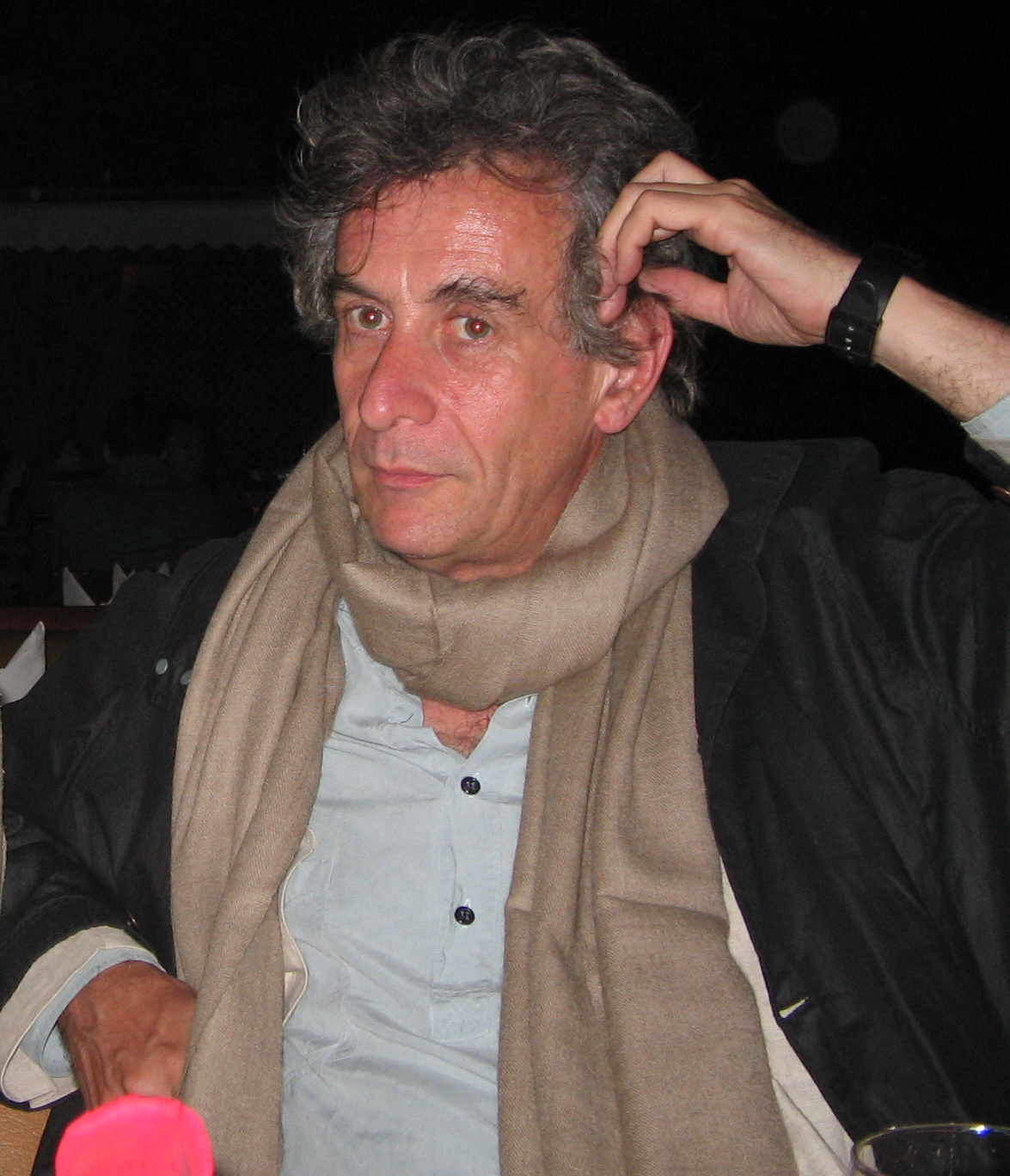 Serge Quadruppani en novembre 2005 à New Delhi.